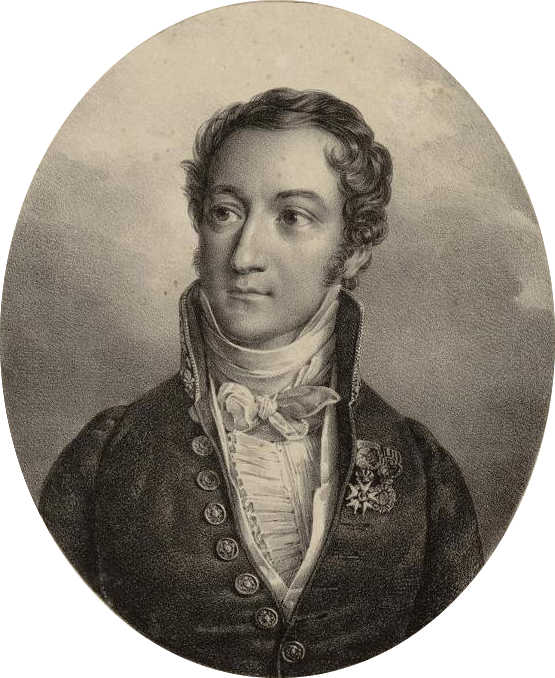 Peyronnet, garde des sceaux